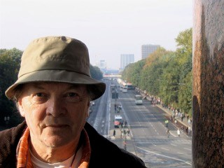 Forfatteren og journalisten, Niels Peter Juel Larsen, fotograferet i Berlin